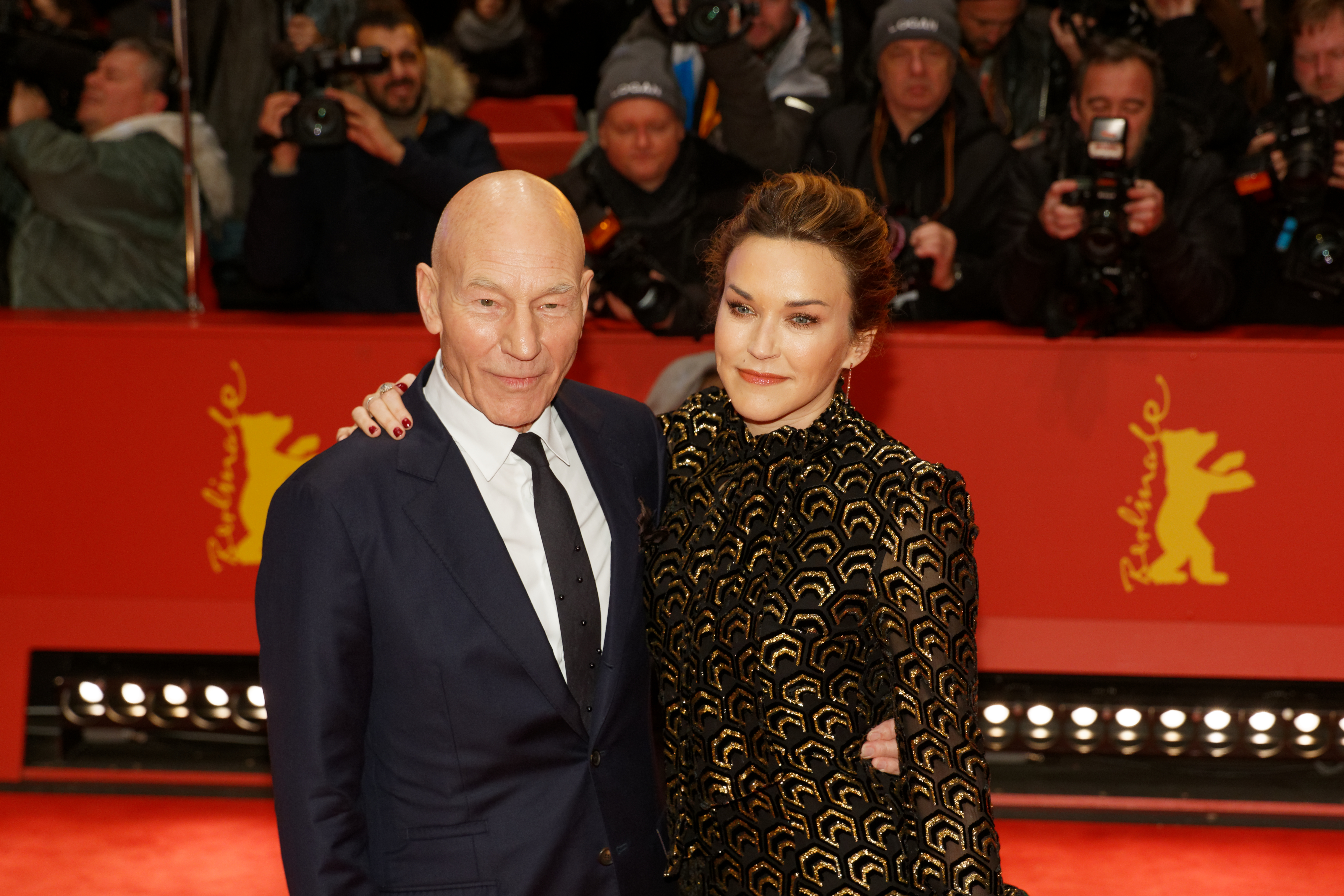 Patrick Stewart und Begleitung zur Weltpremiere von Logan bei der Berlinale 2017